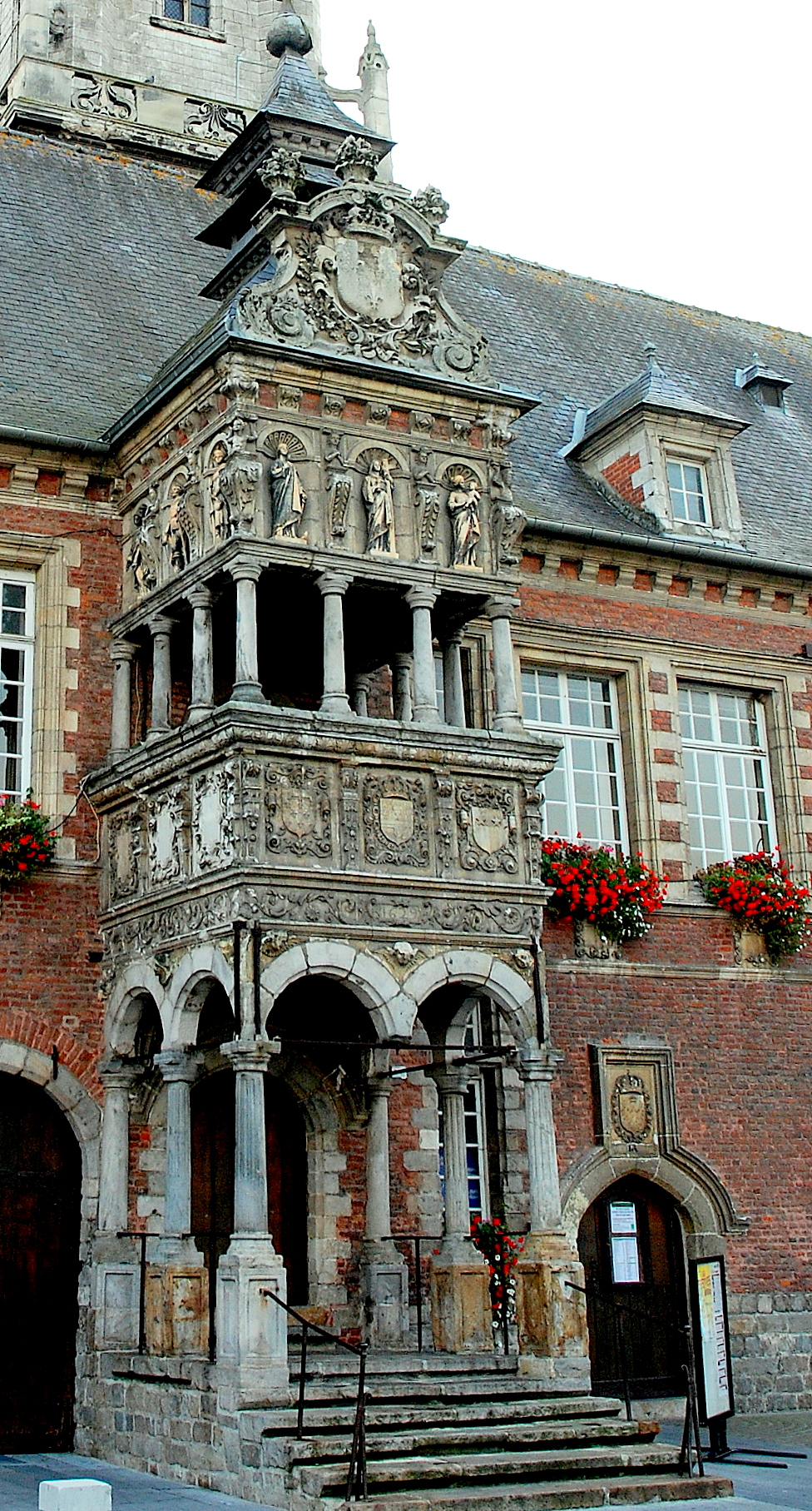 palais de Marie d'Hongrie, maintenant hôtel de ville à Hesdin